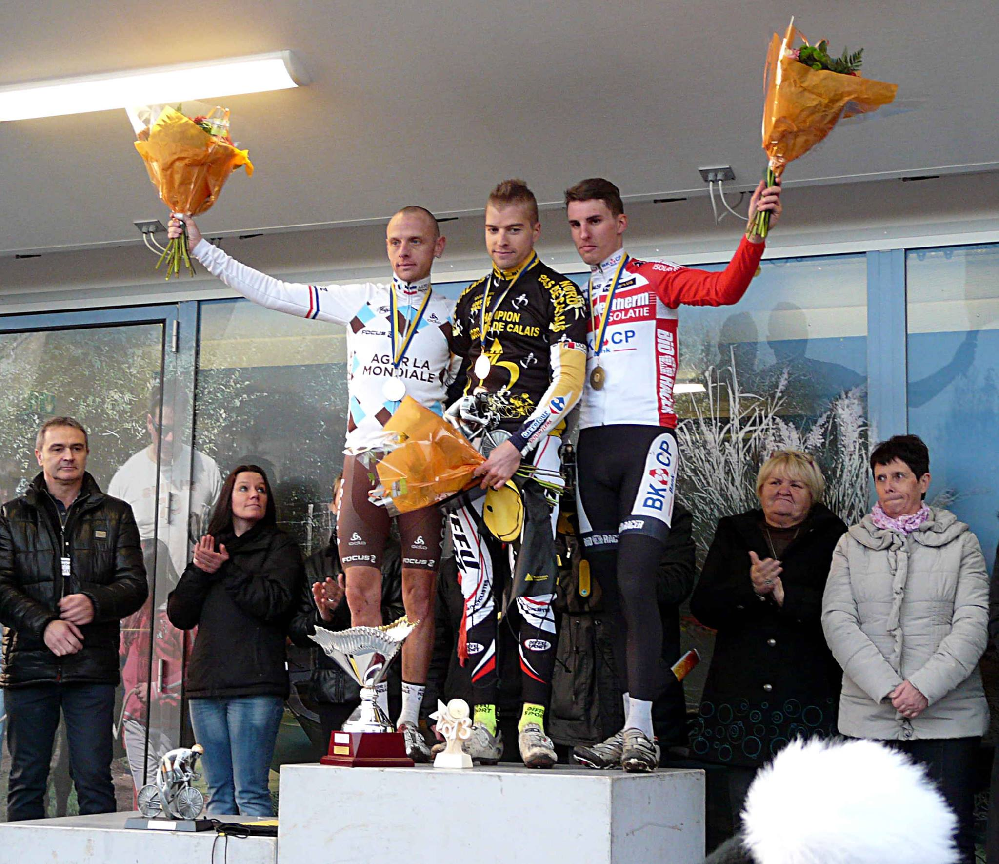 Podium élite du Championnat Régional Nord-Pas-de-Calais de cyclo-cross de Marles-les-Mines le 15 décembre 2013